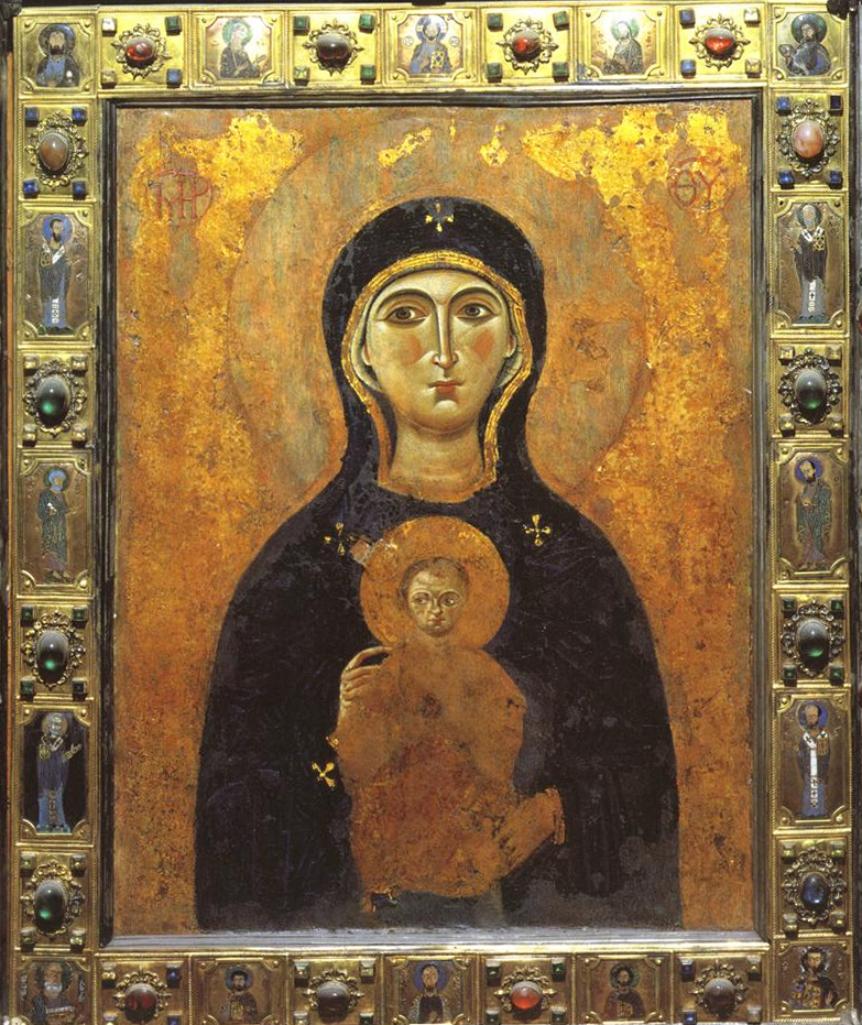 Madonna Nicopeia nella cappella della Madonna Nicopeia giunta a Venezia dopo la Quarta Crociata (1204)